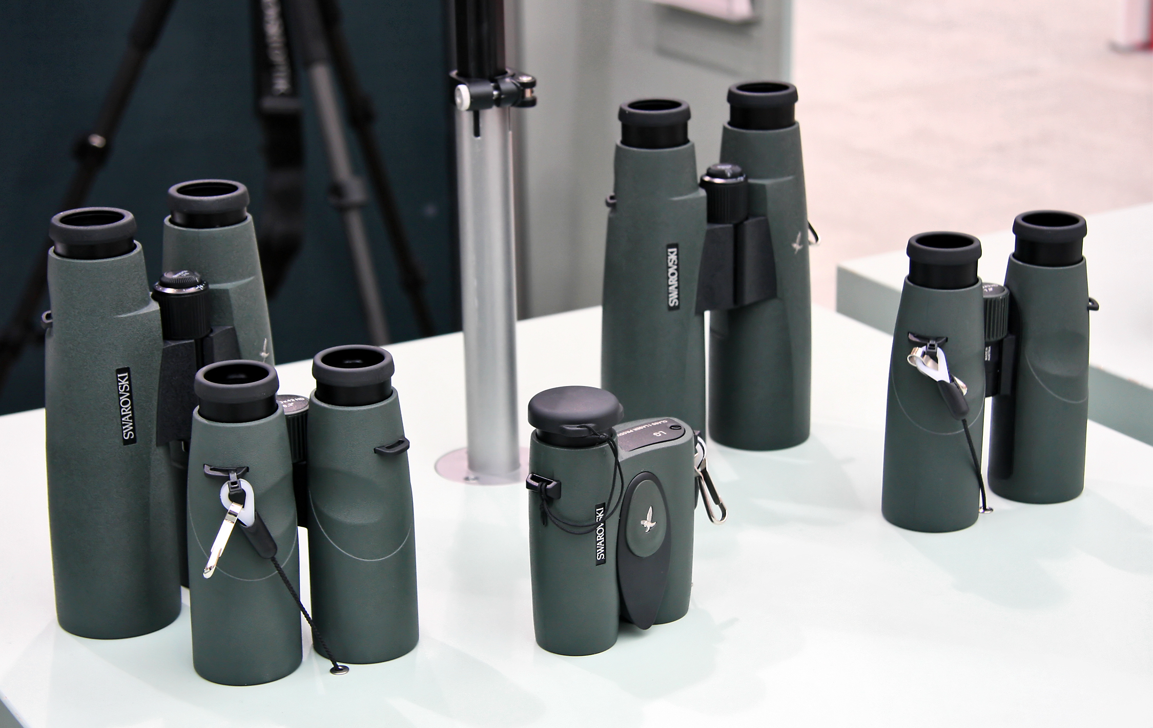 Оптика от Сваровски лично у меня вызывает удивление, поскольку эта фирма прочно ассоциируется с образом дворового гламура и дешевых понтов (Swarovski optics)